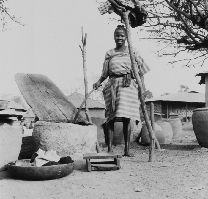 Vroeger stonden op elk Yoruba erf indigo verfpotten. Elk vrouw was zelf verantwoordelijk voor het kleuren van de kleding van het gehele gezin. Zowel oud, verschoten als nieuw katoen werd geverfd. De Yoruba haalden hun indigo uit de Lonchocarpus cyanescens, 'elu' genoemd en vermengden dit met Indigofera arrecta (Oei, 1985: 94). In 1958 kwam de synthetische indigo op de markt en vervingen de Yoruba de inlandse indigo voor zestig procent met de synthetische. Daarnaast verschoof het indigo verven meer en meer naar gecentraliseerde ververijen (S. Wijs 2009).